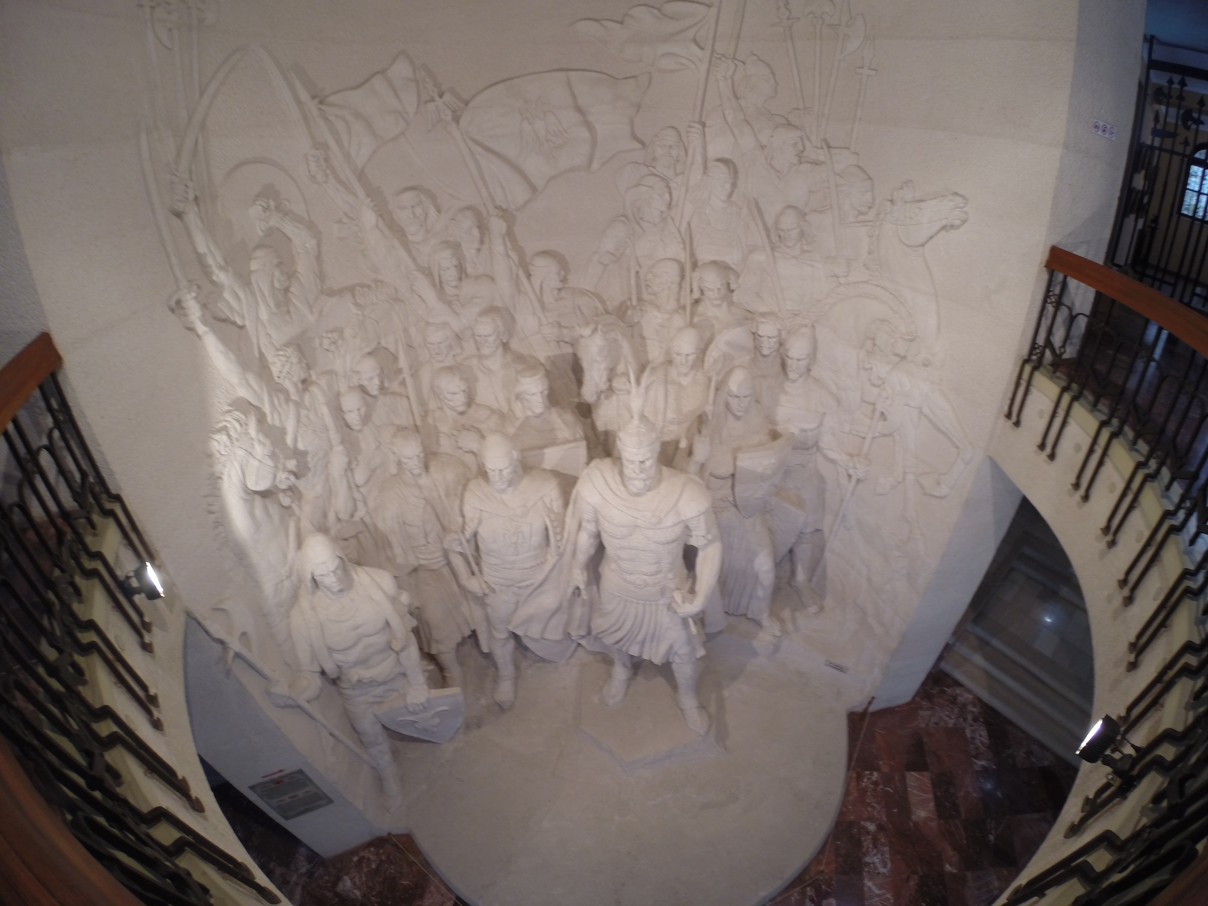 Kalaja e Krujes